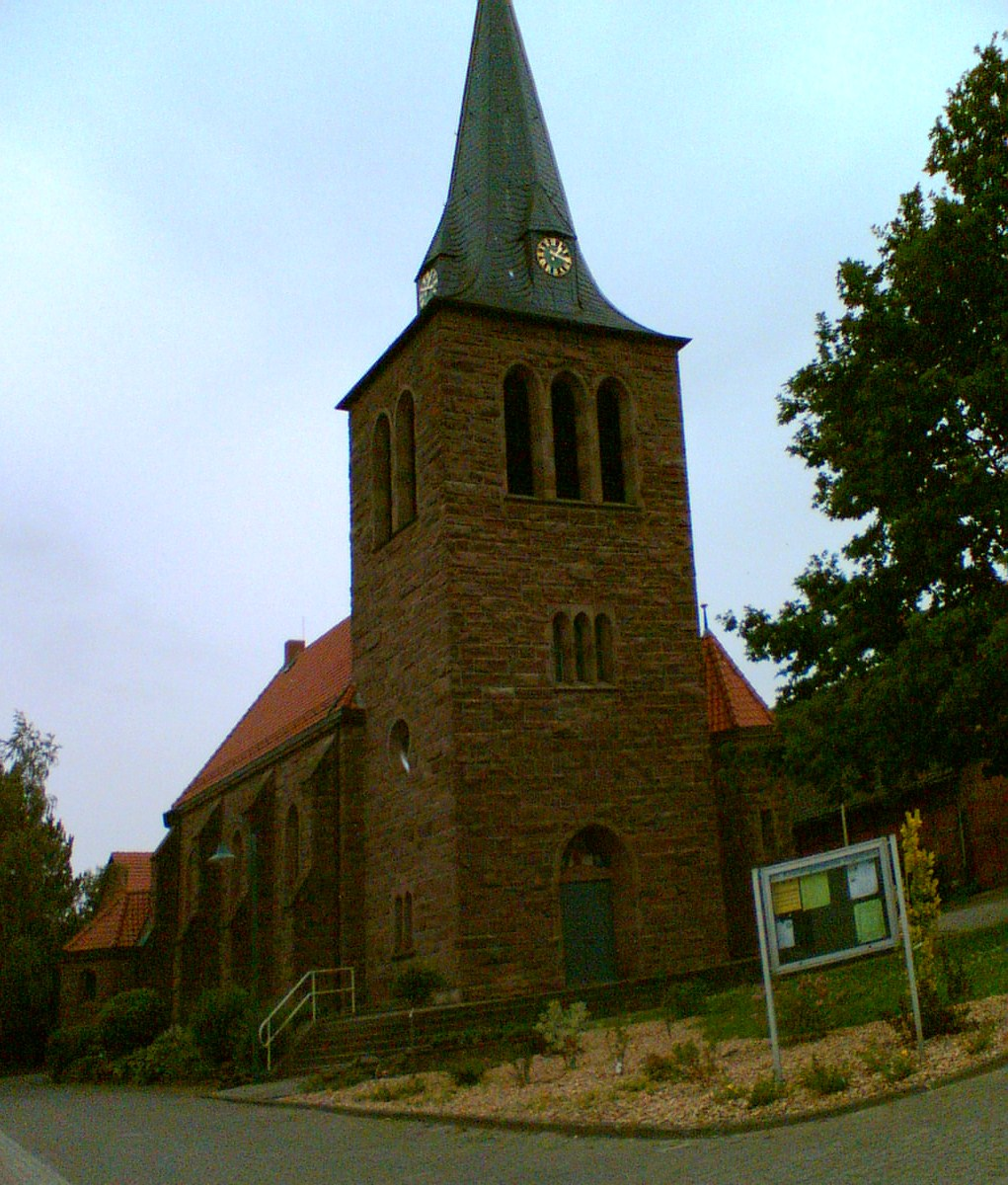 Neugotik